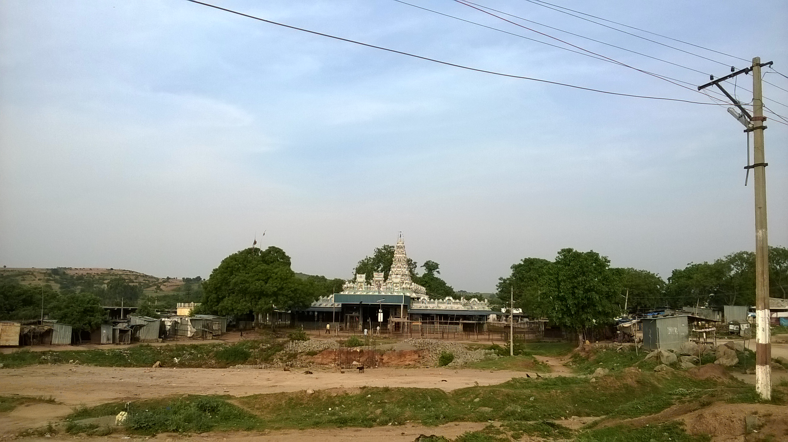 మైసిగండి మైసమ్మ దేవాలయం